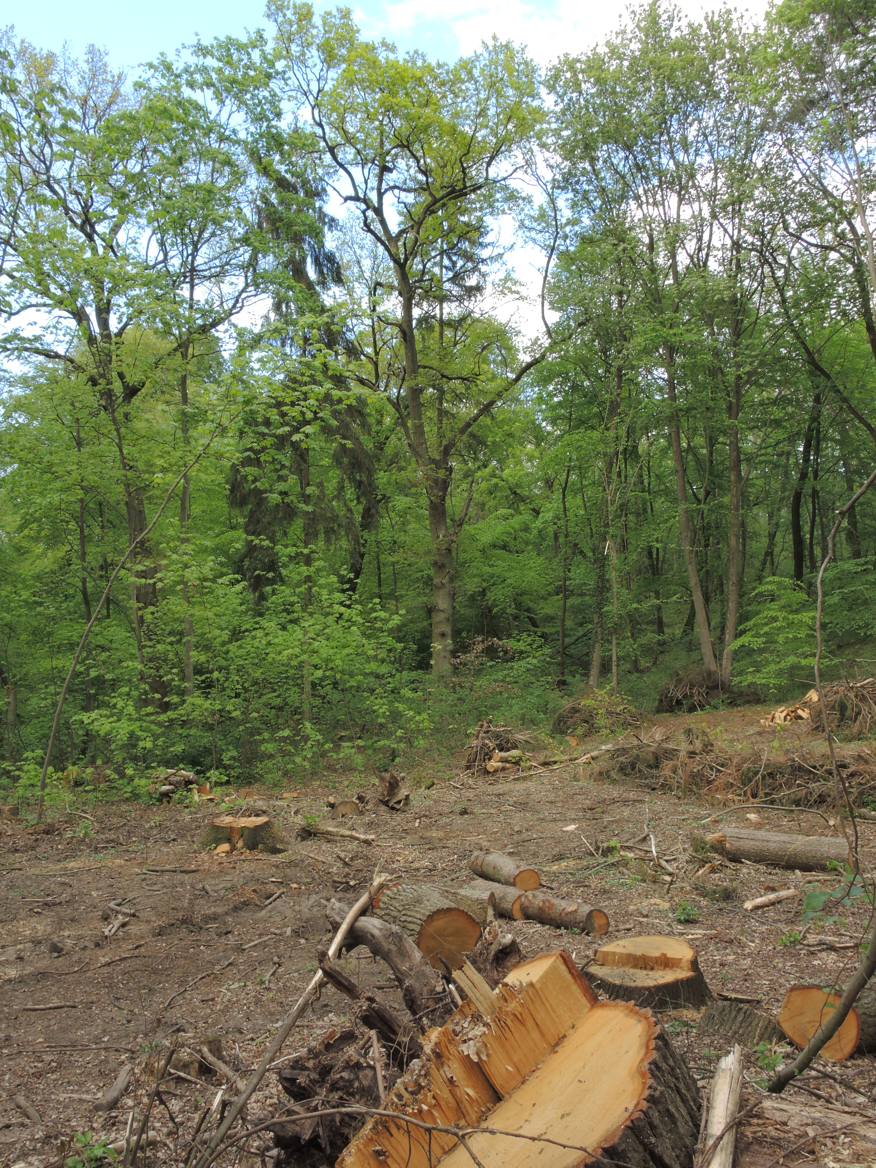 Brandenburg: Märkisch Oderland: Abholzung Flora-Fauna-Habitat Cöthener Fliesstal, südöstlicher Teil, am südlichem Gebietszugang nahe Ortsausgang Cöthen. Kleinflächiger Kahlschlag.